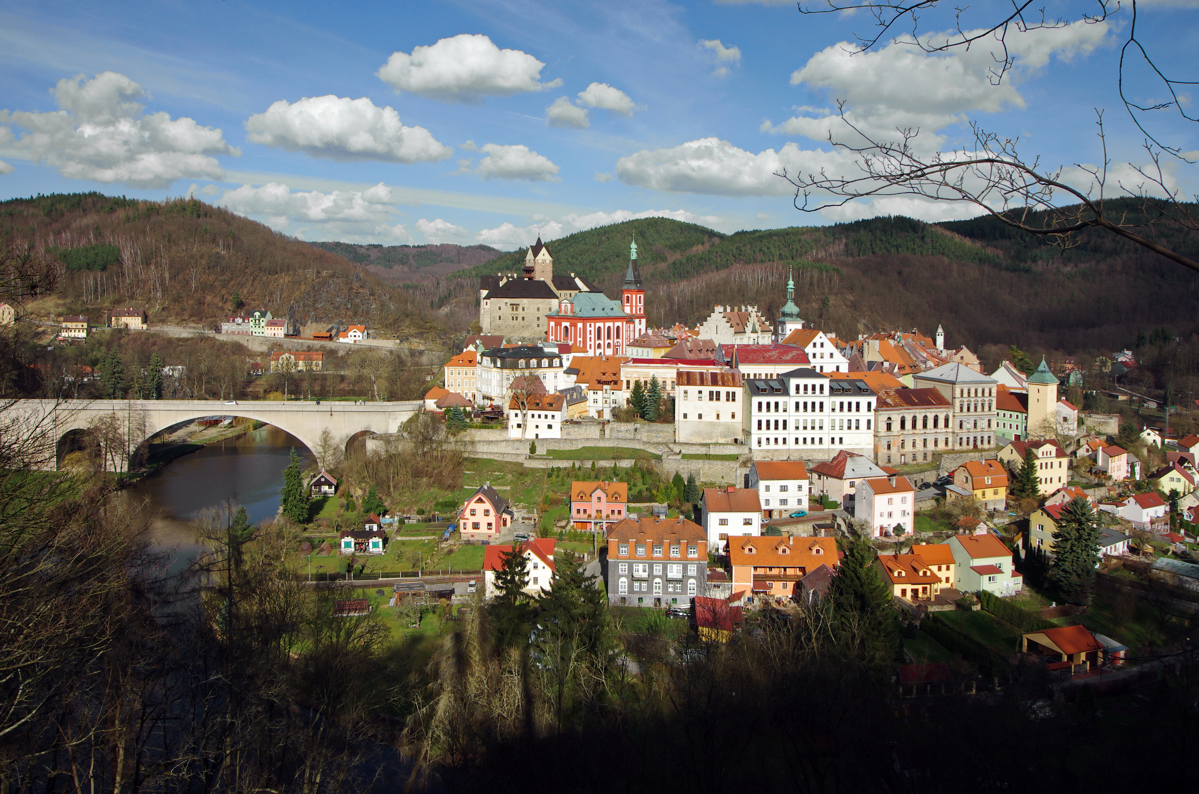 pohled na město Loket s hradem, okres Sokolov